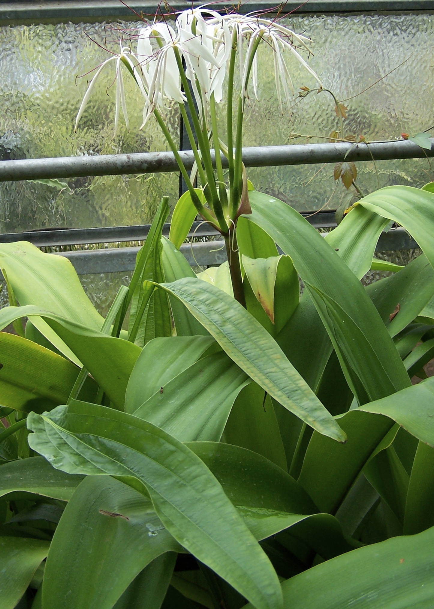 Crinum kunthianum 17 juin 2006 Vieux jardin botanique de Göttingen